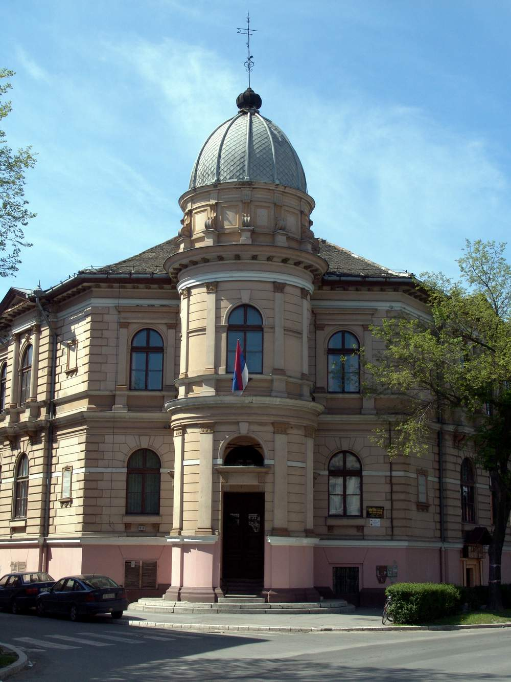 Слика школе сликано фотоапаратом наставника техничког